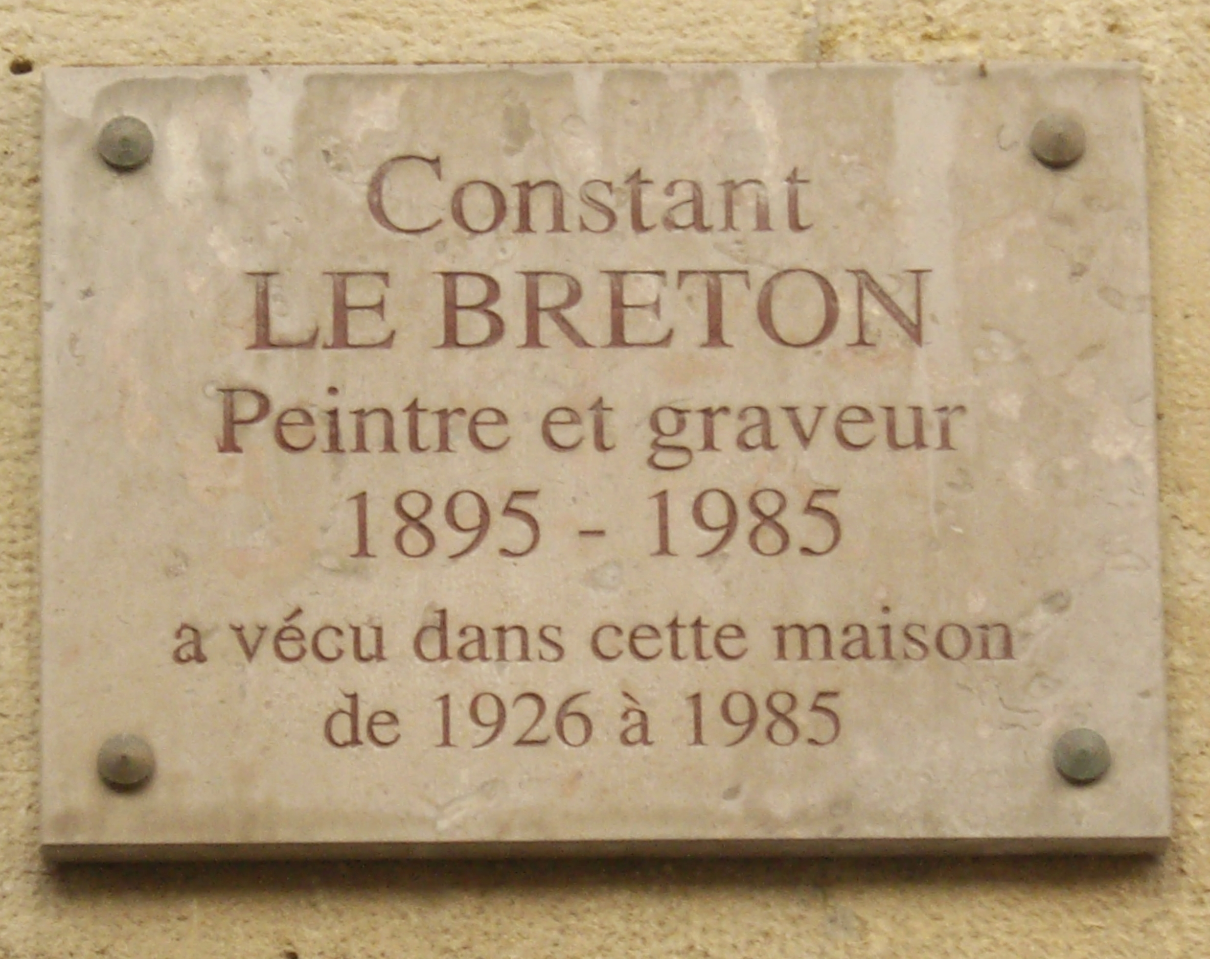 Plaque apposée au n° 21 de la rue Visconti, Paris 6e, où habita le peintre Constant Le Breton (1895-1985) de 1926 à 1985.